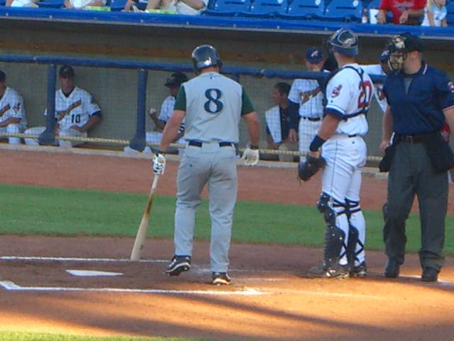 Koby Clemens at bat 15:28, 28 June 2006 . . Nick22aku . . 640×480 (85 KB)